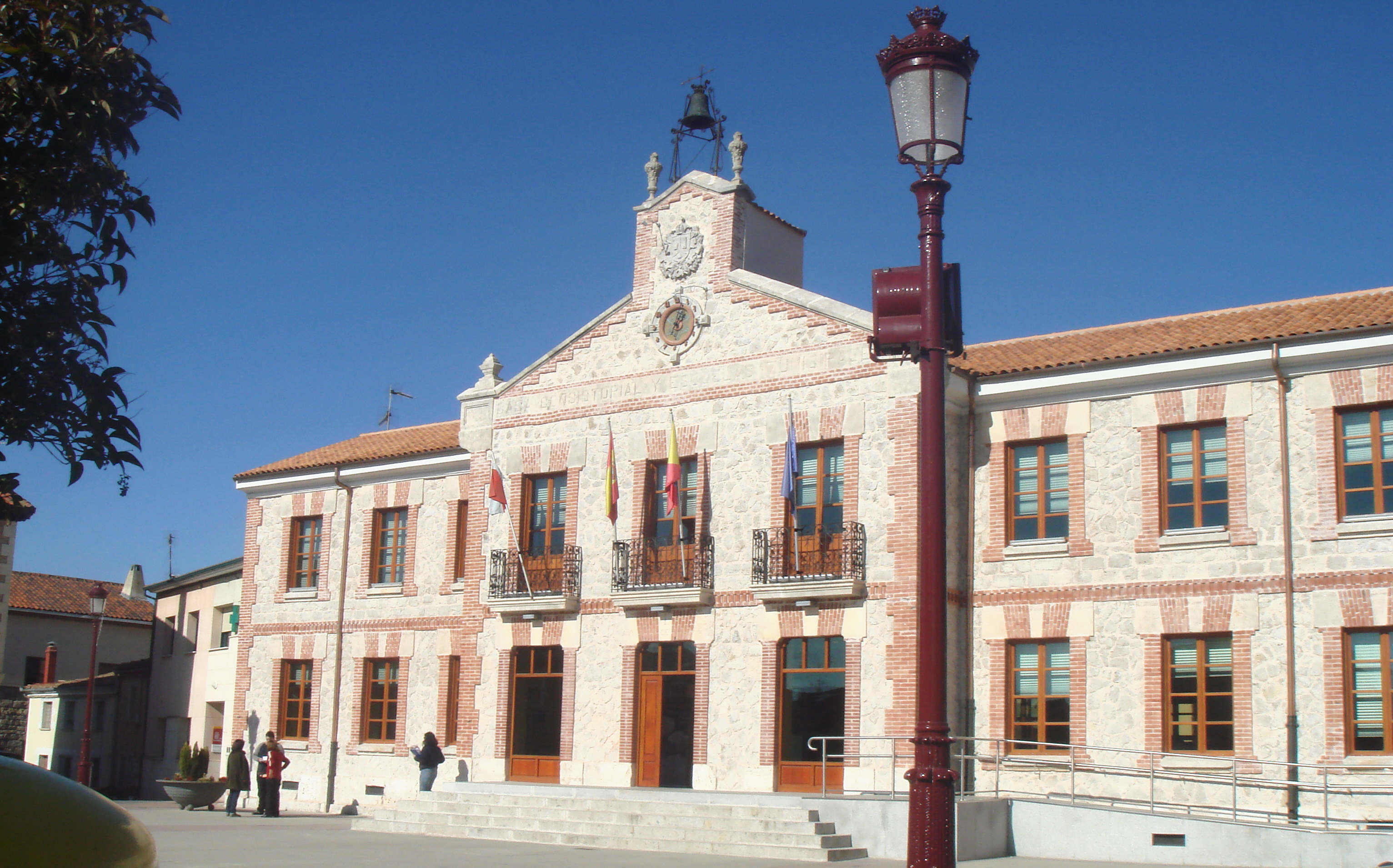 Ayuntamiento Villagonzalo Pedernales, Burgos, España.